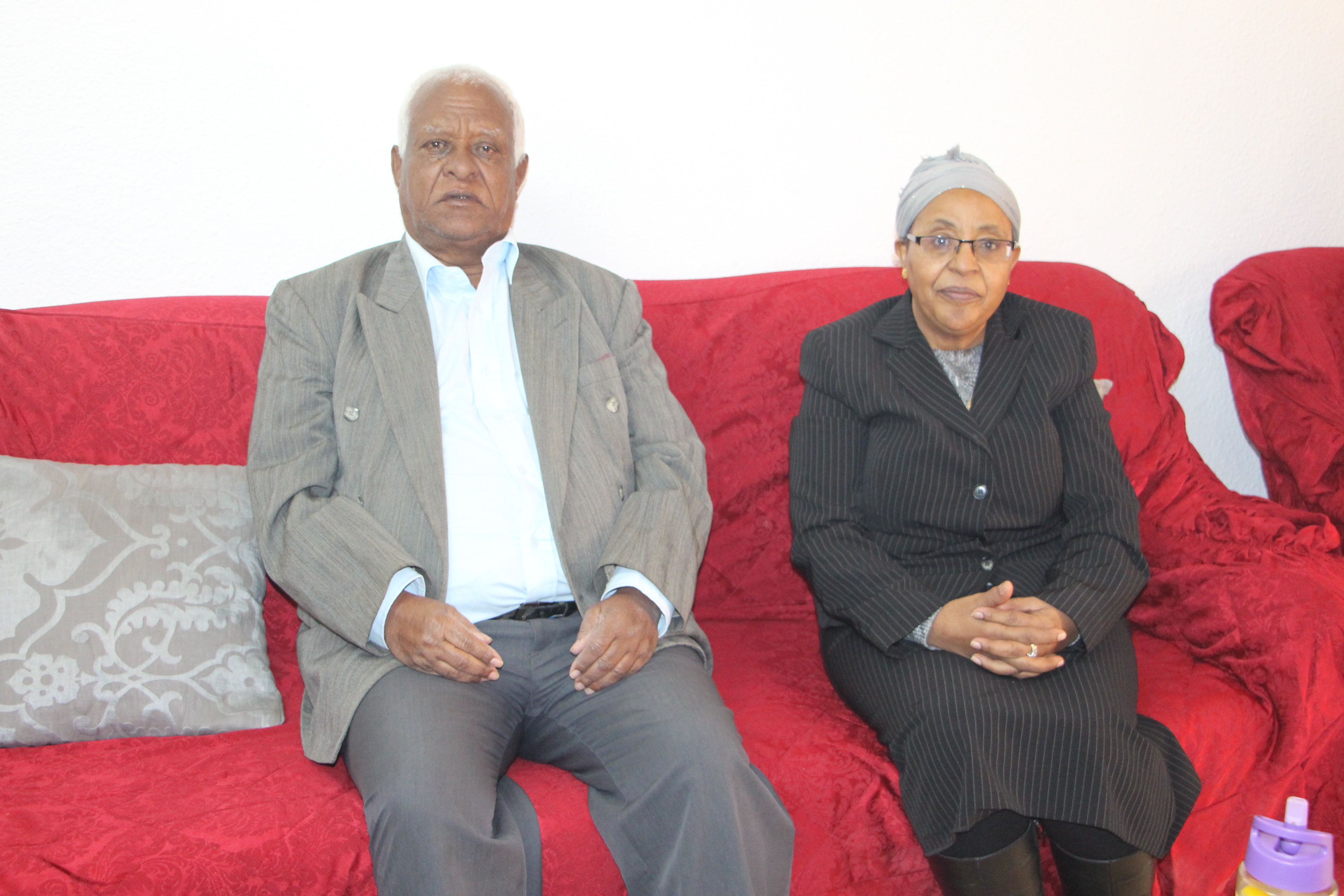 אסרסי גטו עם אשגרה זללו, שאת בנו יאסו הצילה כתינוק במחנה פליטים בסודן. ראשון לציון, ינואר 2019